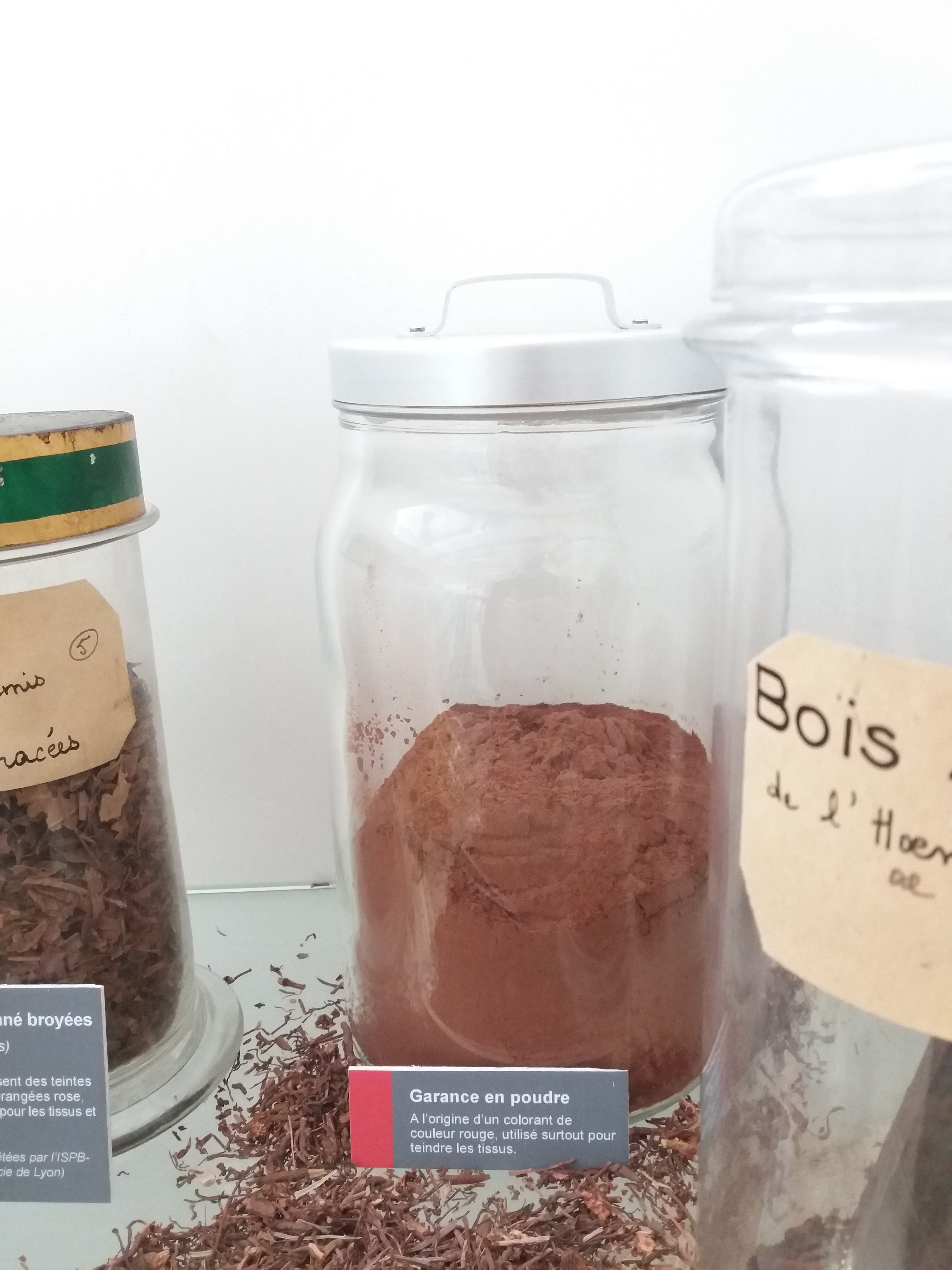 Garance en poudre.